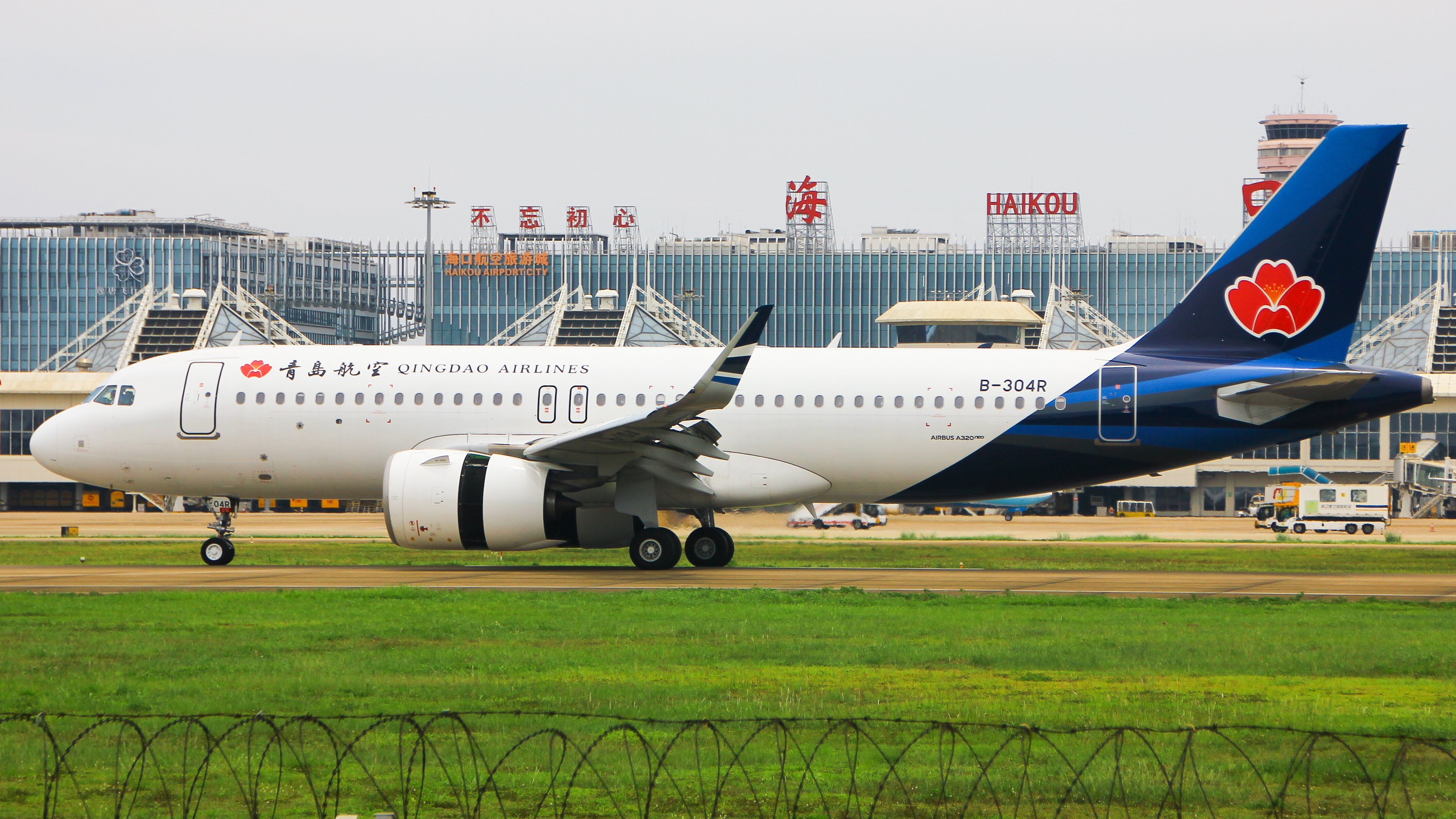 中文（中国大陆）: 青岛航空空客A320neo（B-304R）在海口美兰机场